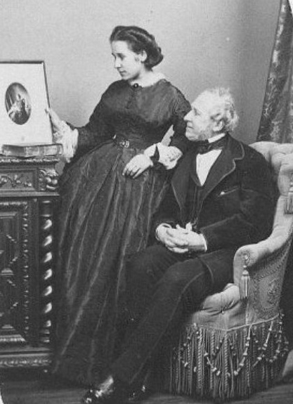 Князь Николай Иванович Трубецкой (1807—1874) с дочерью Екатериной (1840—1875).